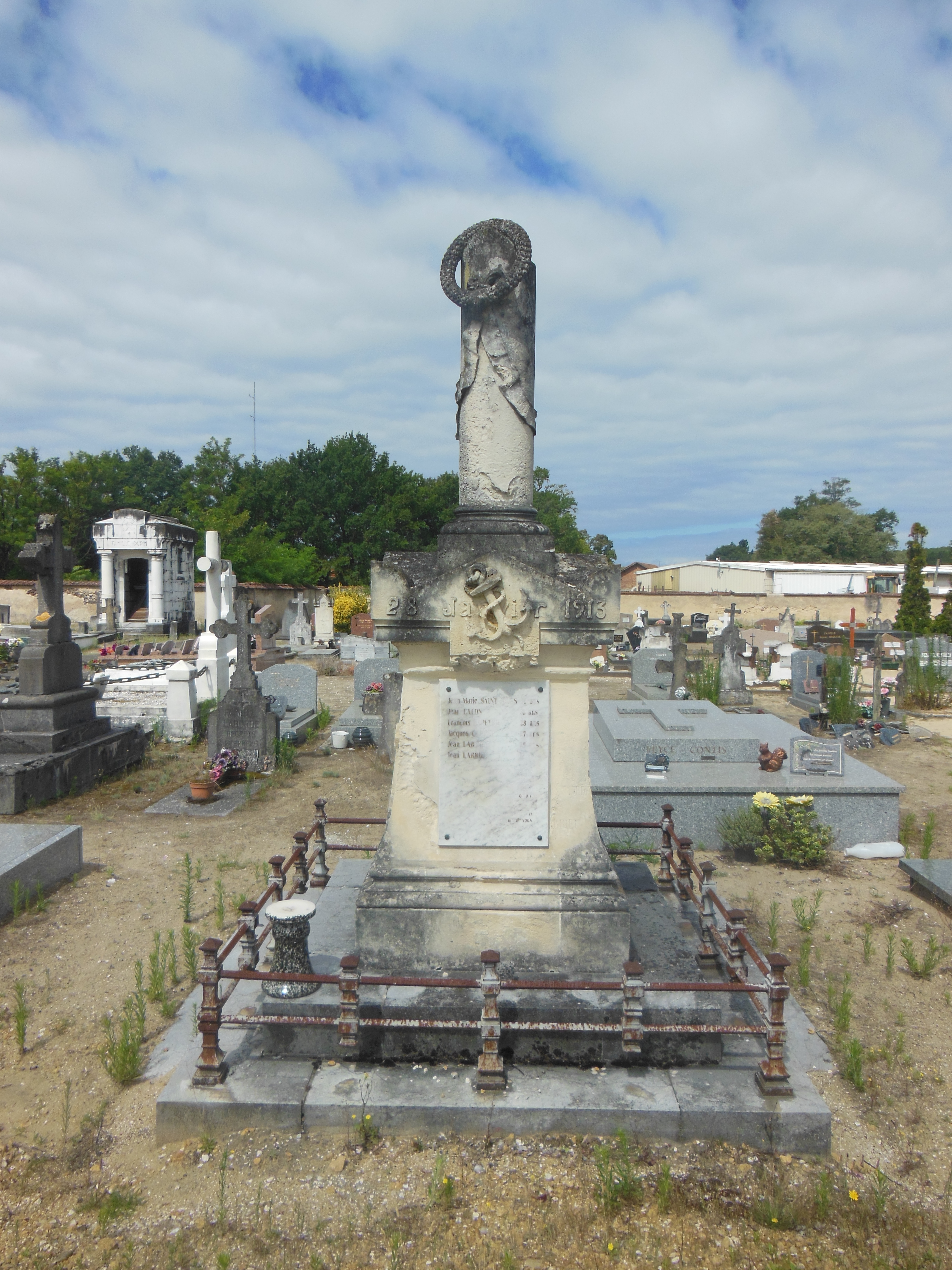 Cénotaphe des six marins péris en mer le 28 janvier 1913, édifié dans l'ancien cimetière de Mimizan (Landes, France)